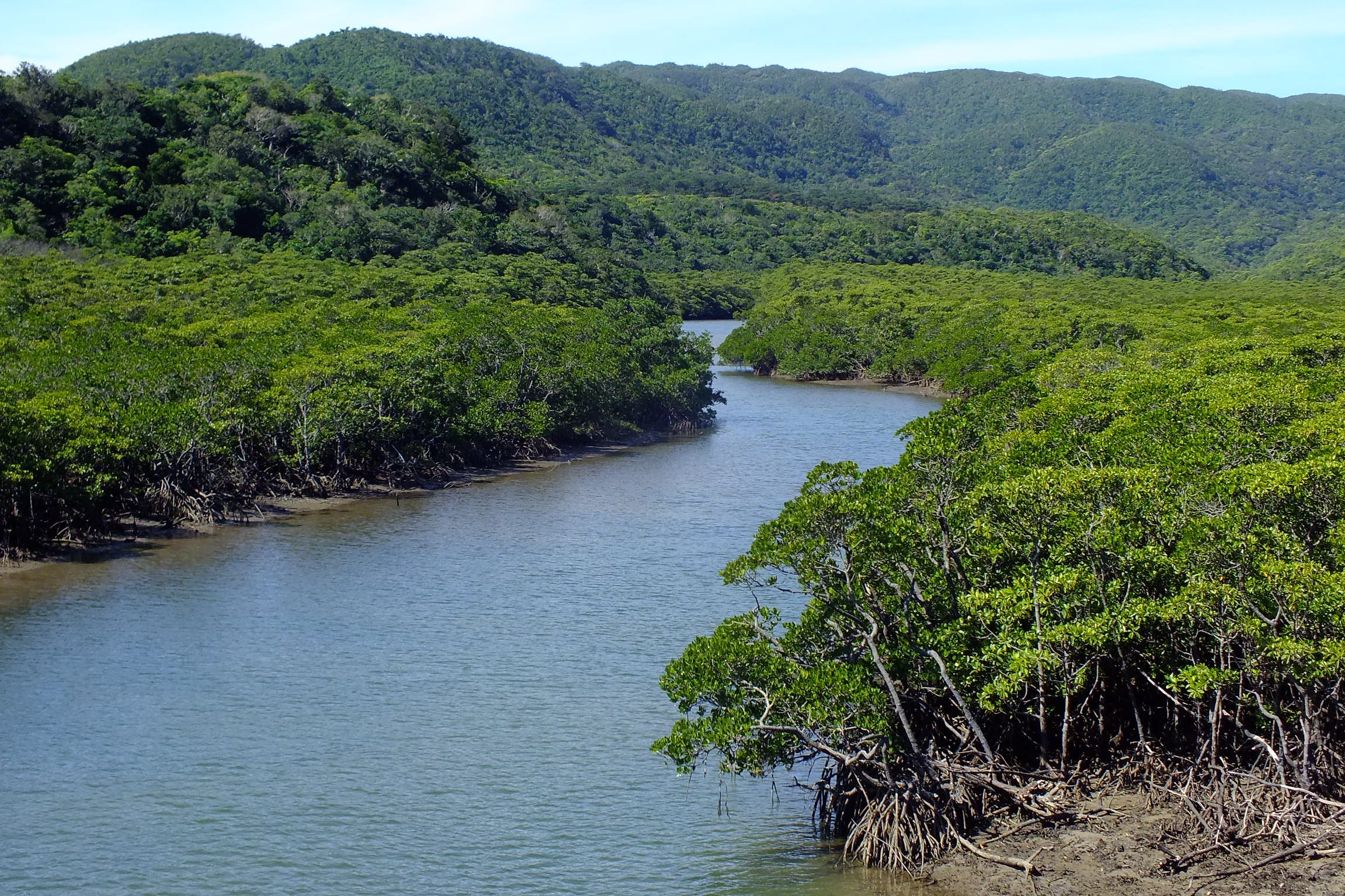 2017-01-29 Komi beach in Iriomotejima,Mangrove of Shiira river 後良川